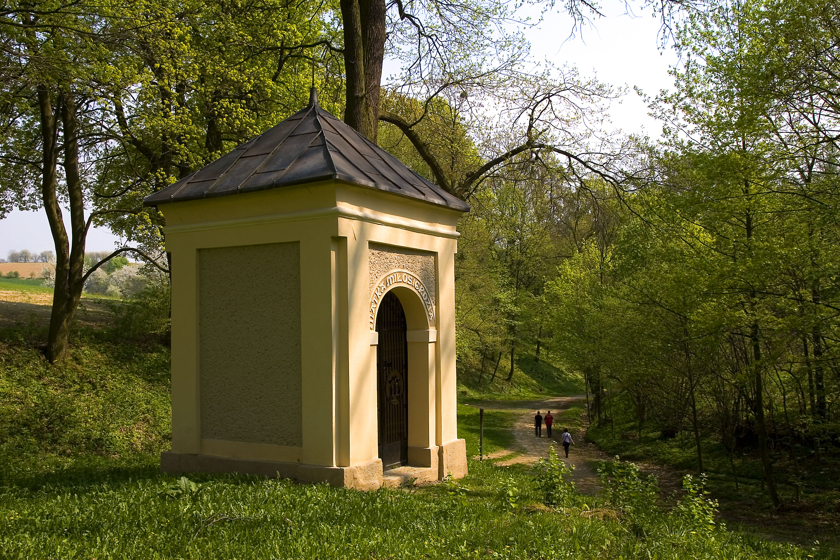 Góra św. Anny, kaplica Matka Miłosierdzia, Gmina Leśnica, powiat strzelecki